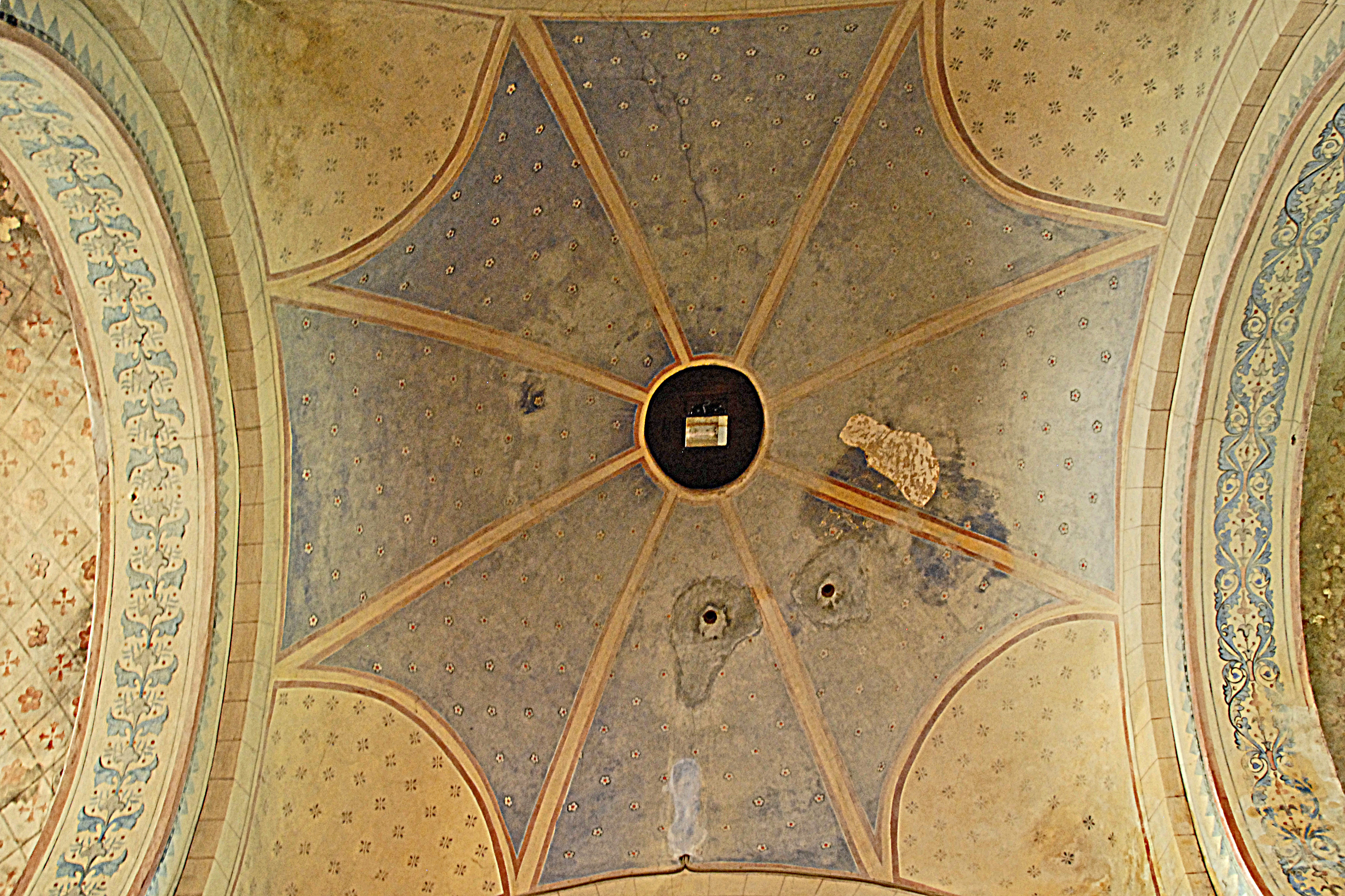 Vierungskuppel